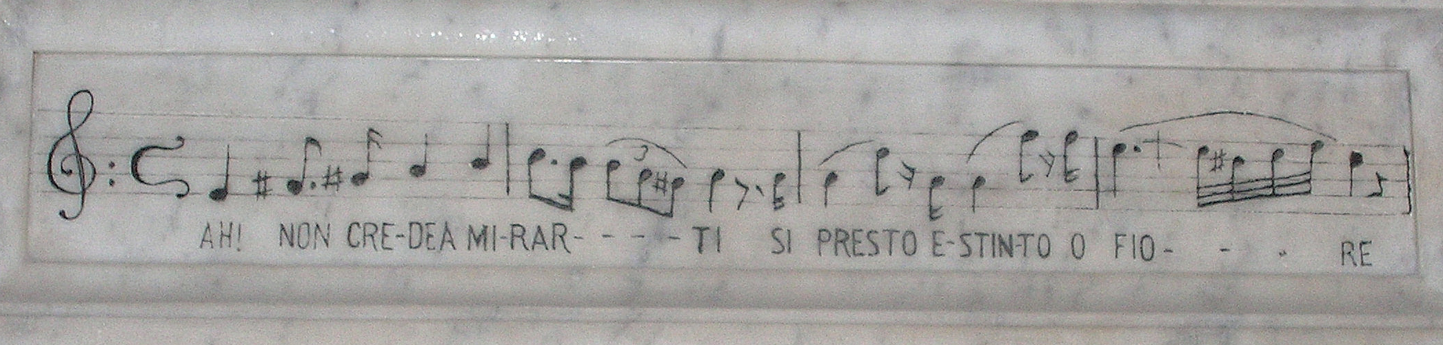 Monumento a Bellini, Cattedrale di Catania